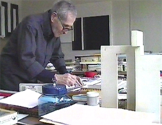 Portrait de Julije Knifer